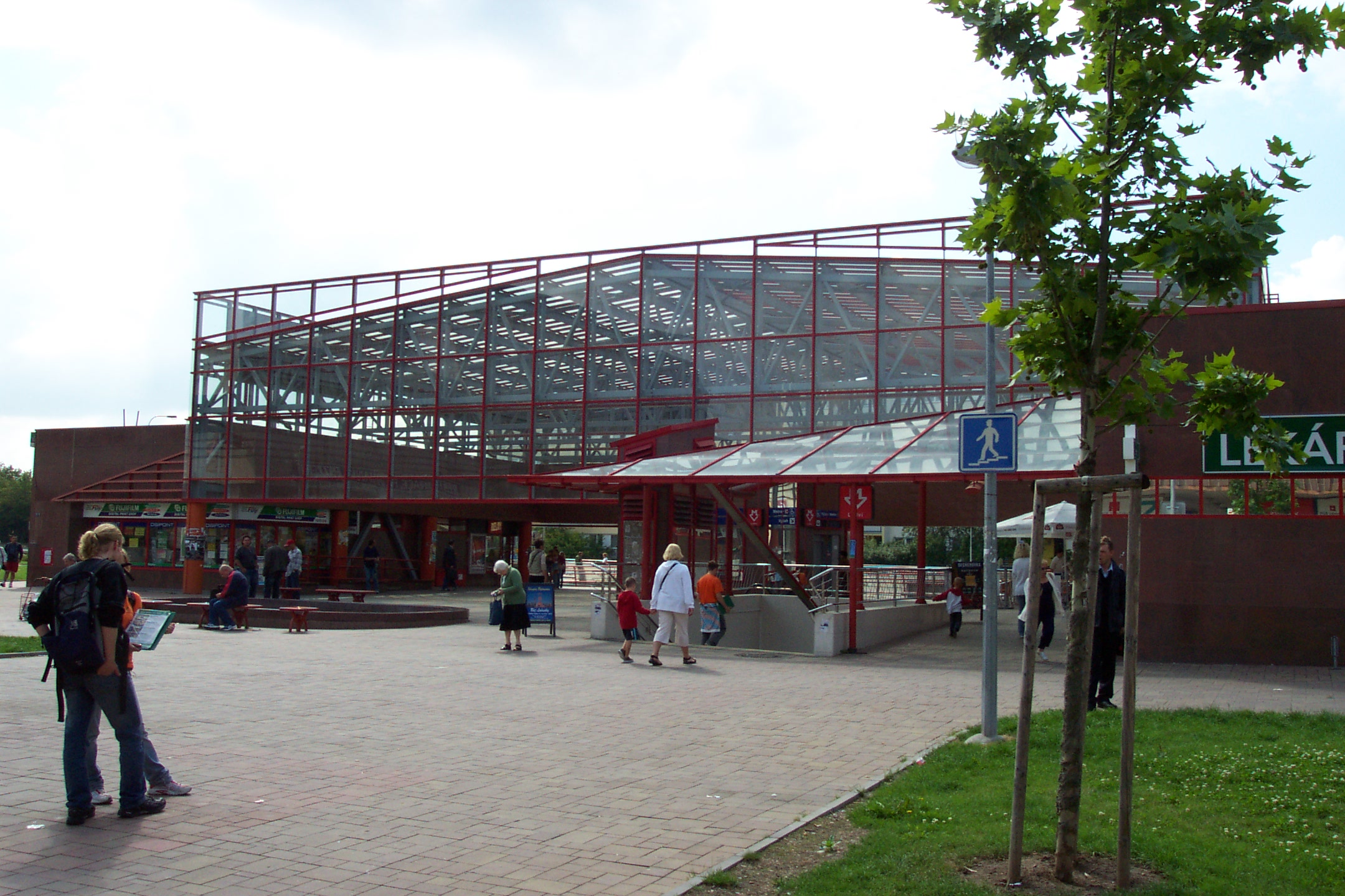 Metro station Ládví in Prague, opened 2004 - Stanice metra Ládví v Praze, otevřena v roce 2004